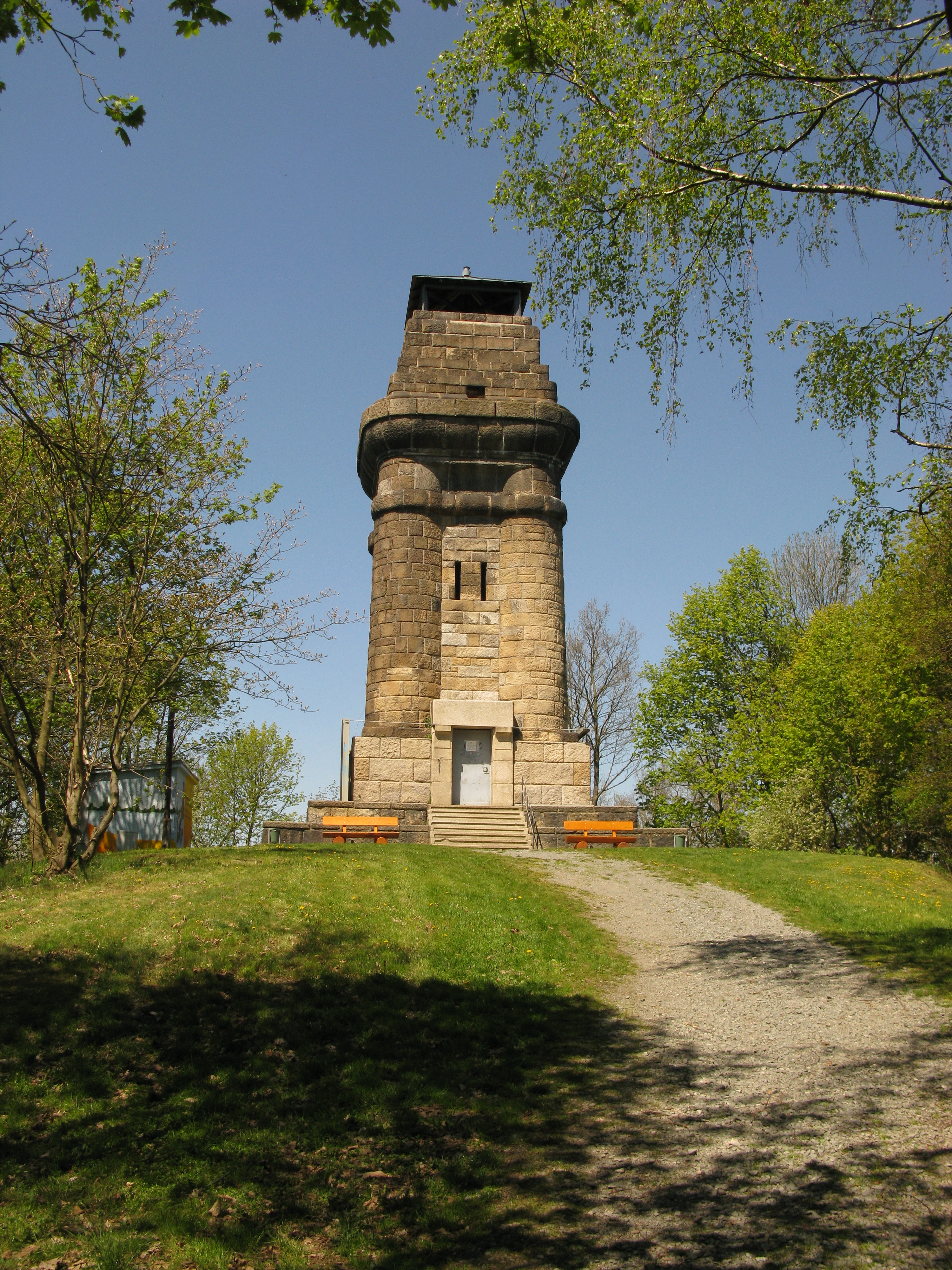 Kemmlerturm in Plauen